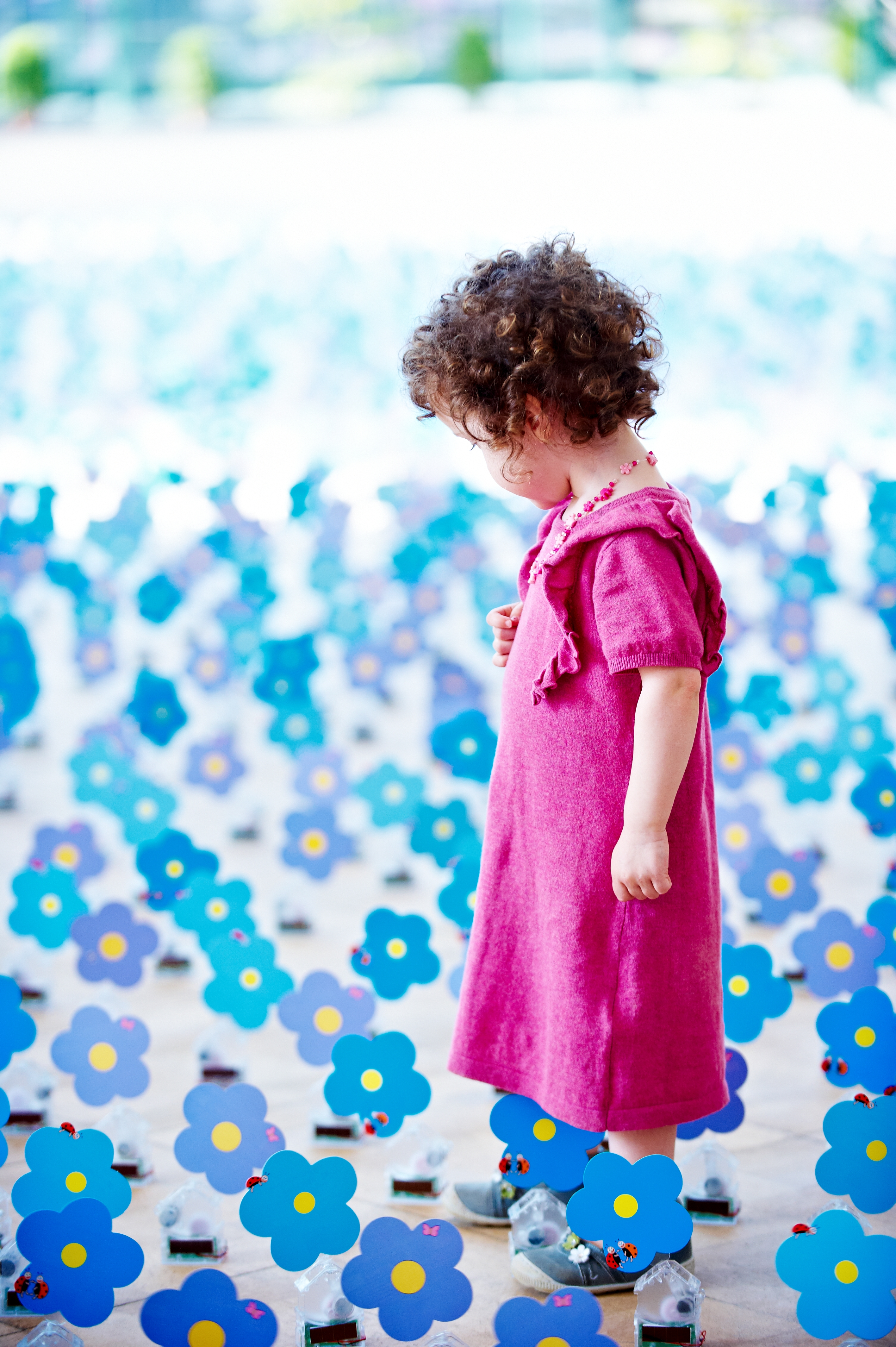 Alexandre Dang - Serres Royales de Laeken, pour Child Focus, 2010